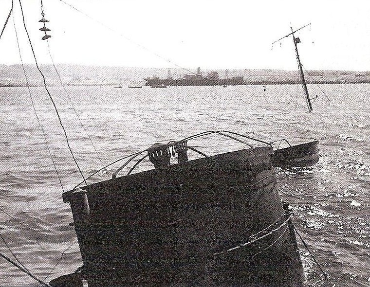 Il cacciatorpediniere Zeffiro affondato da aerosiluranti a Tobruk.